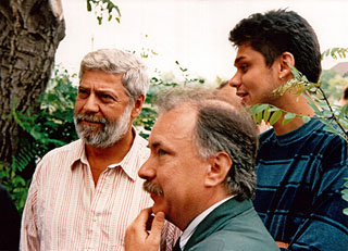 A házigazda Farkasházy Tivadar kalauzolja Horváth Balázst és Deutsch Tamást - Szárszói Találkozó 1994